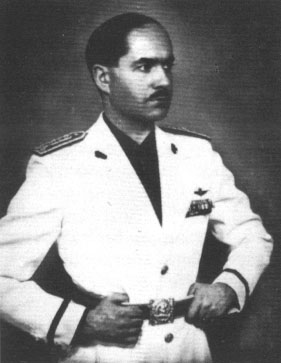 Alessandro Pavolini photograph